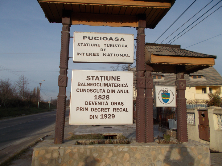 intrarea, dinspre Târgovişte, în Pucioasa